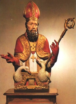 Liudger-Reliquiar im Ludgerus-Dom in Billerbeck.